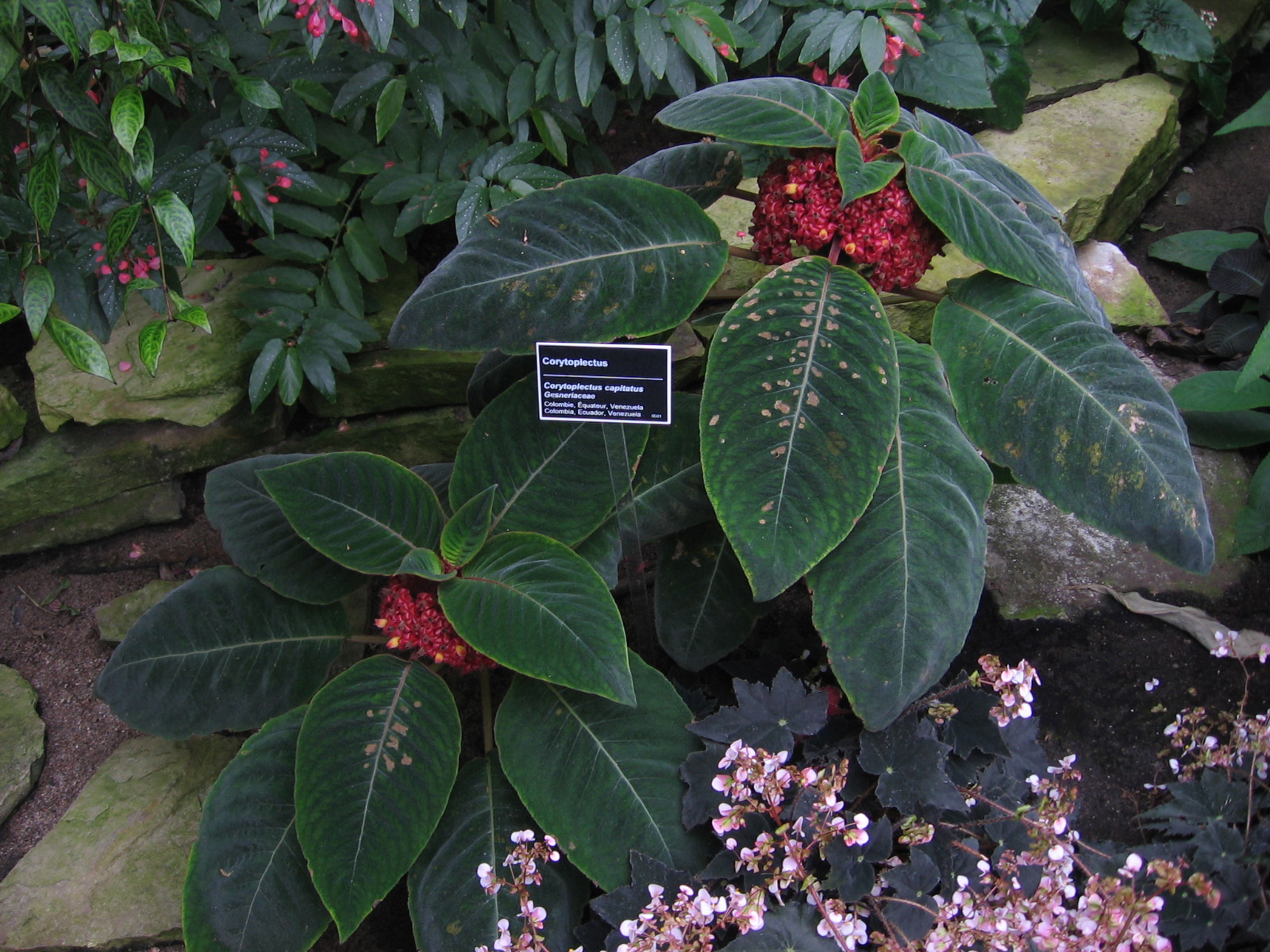 Corytoplectus capitatus, Jardin Botanique de Montréal